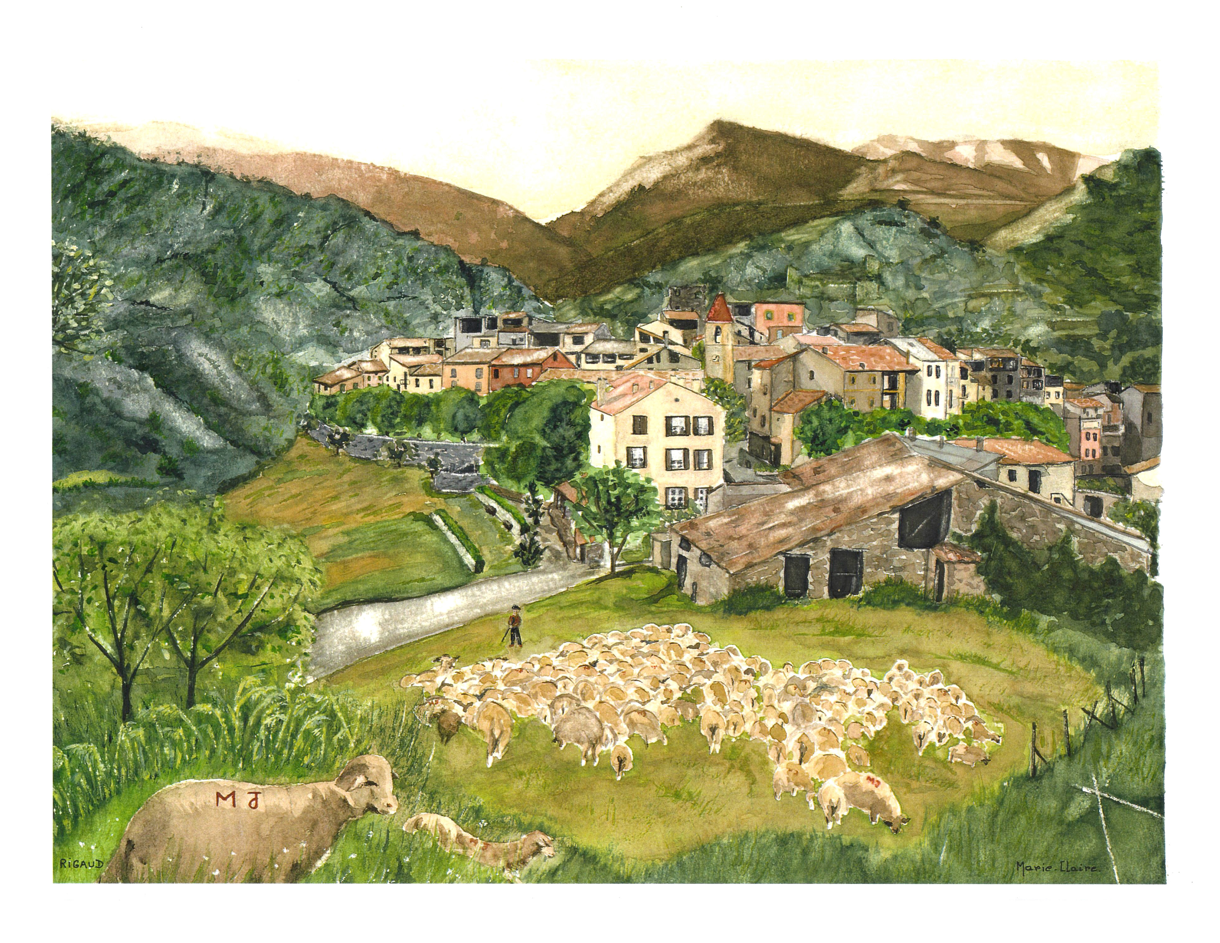 Rigaud (Alpes-Maritimes) - La transhumance des moutons de Jeannine et Jeannot.